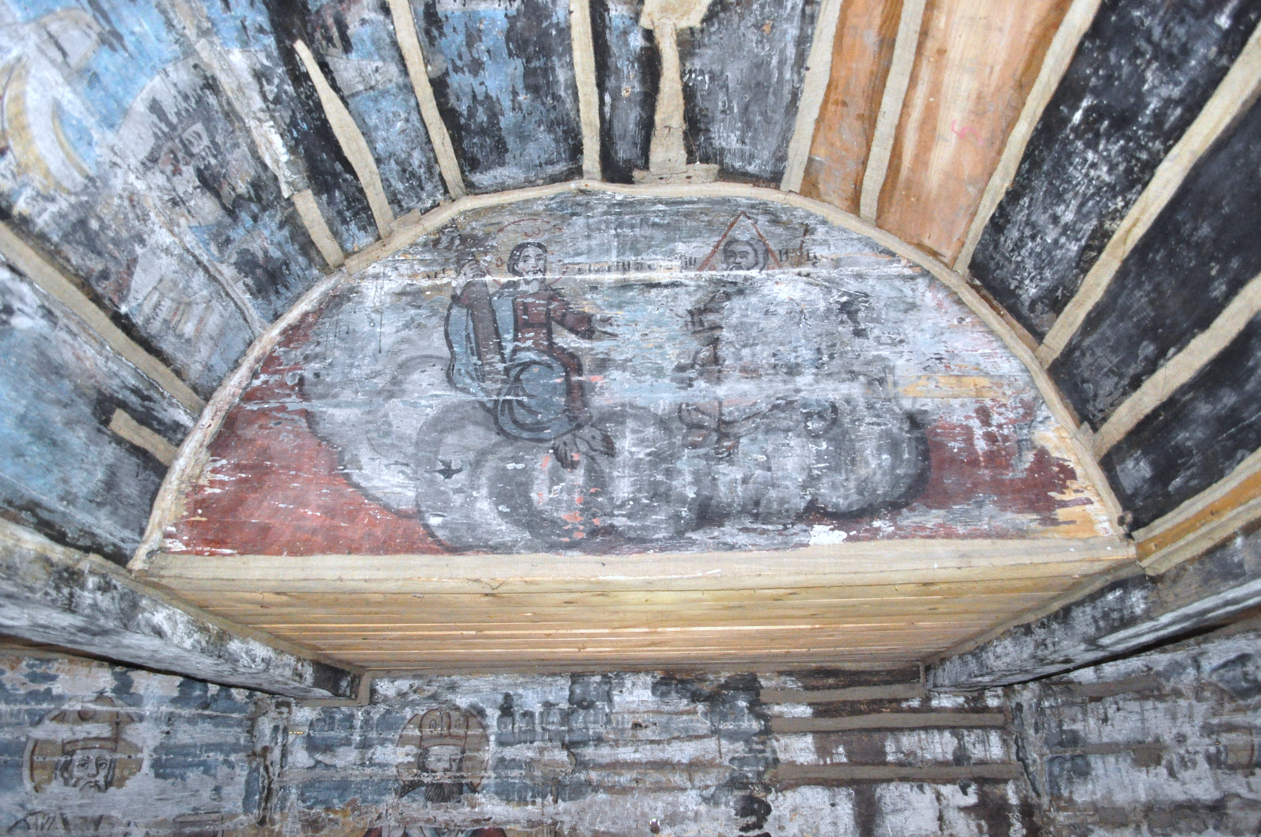 Biserica de lemn „Sf.Trei Ierarhi” din Troaș